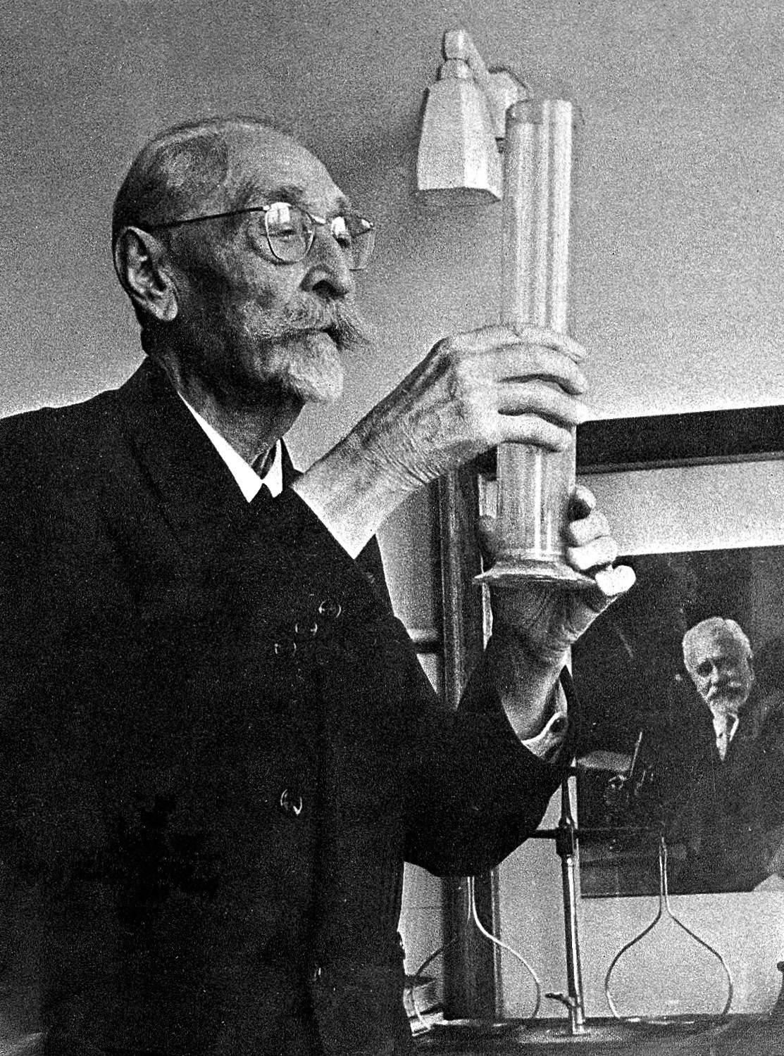 Portrait of Jean Marie Camille Guerin